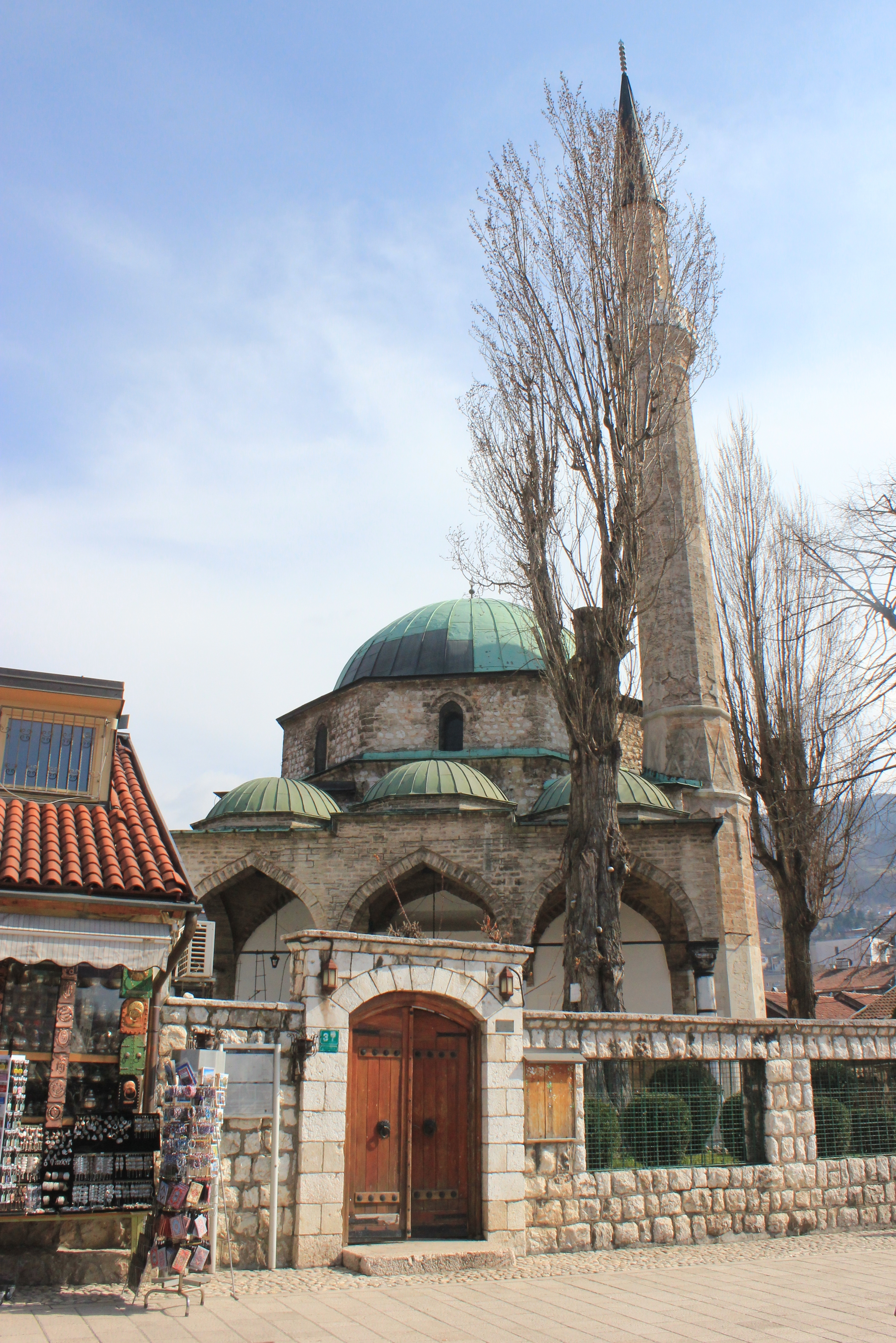 Die Baščaršija-Moschee in Sarajevo